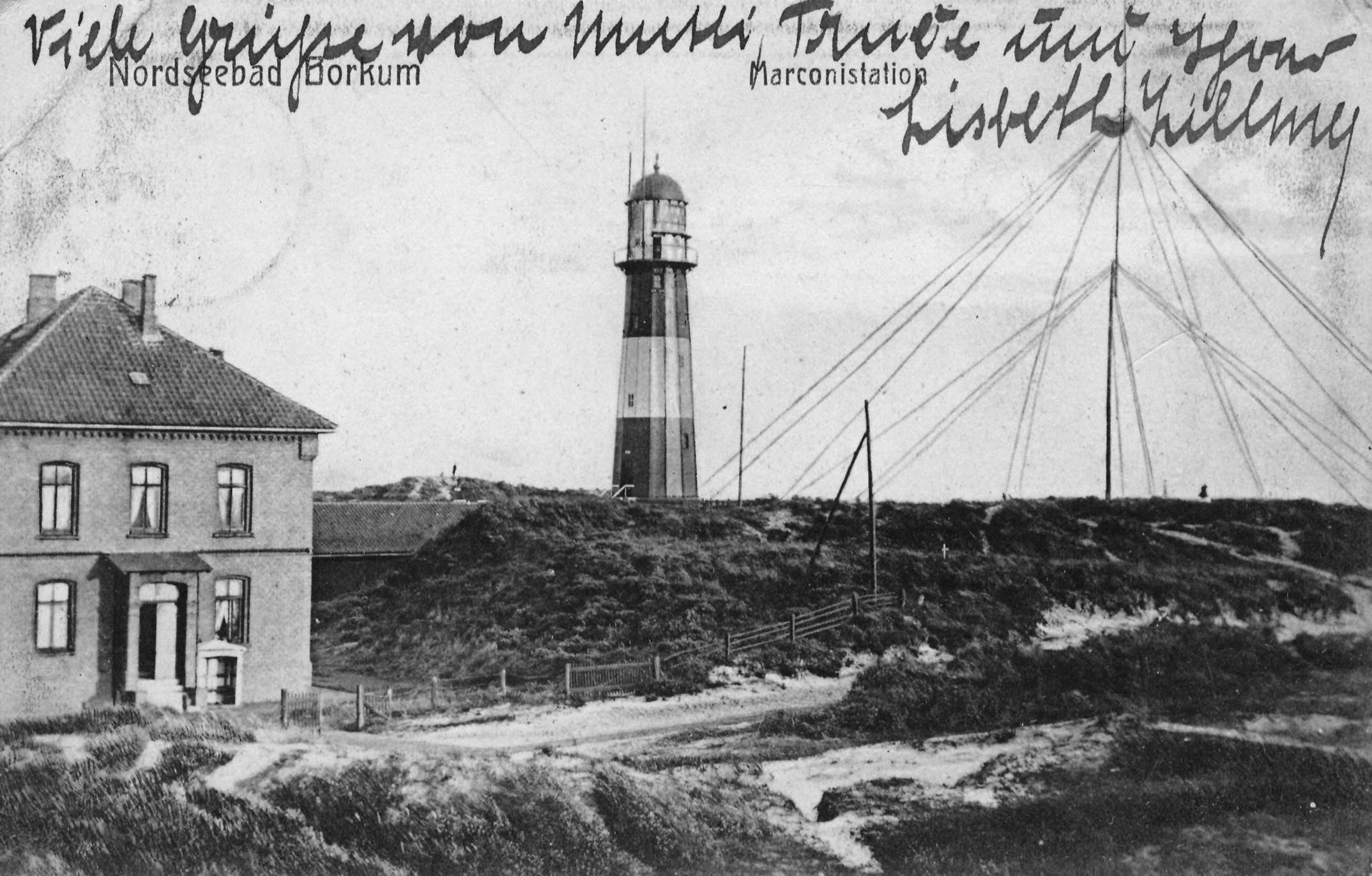 Nordseebad Borkum. Marconistation [Kleiner Leuchtturm].